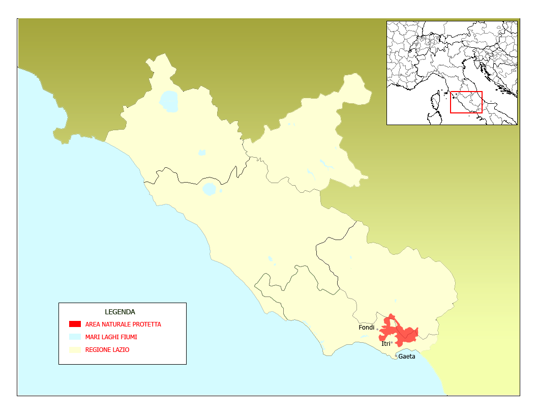 Mappa Parco Monti Aurunci, Lazio, Italia